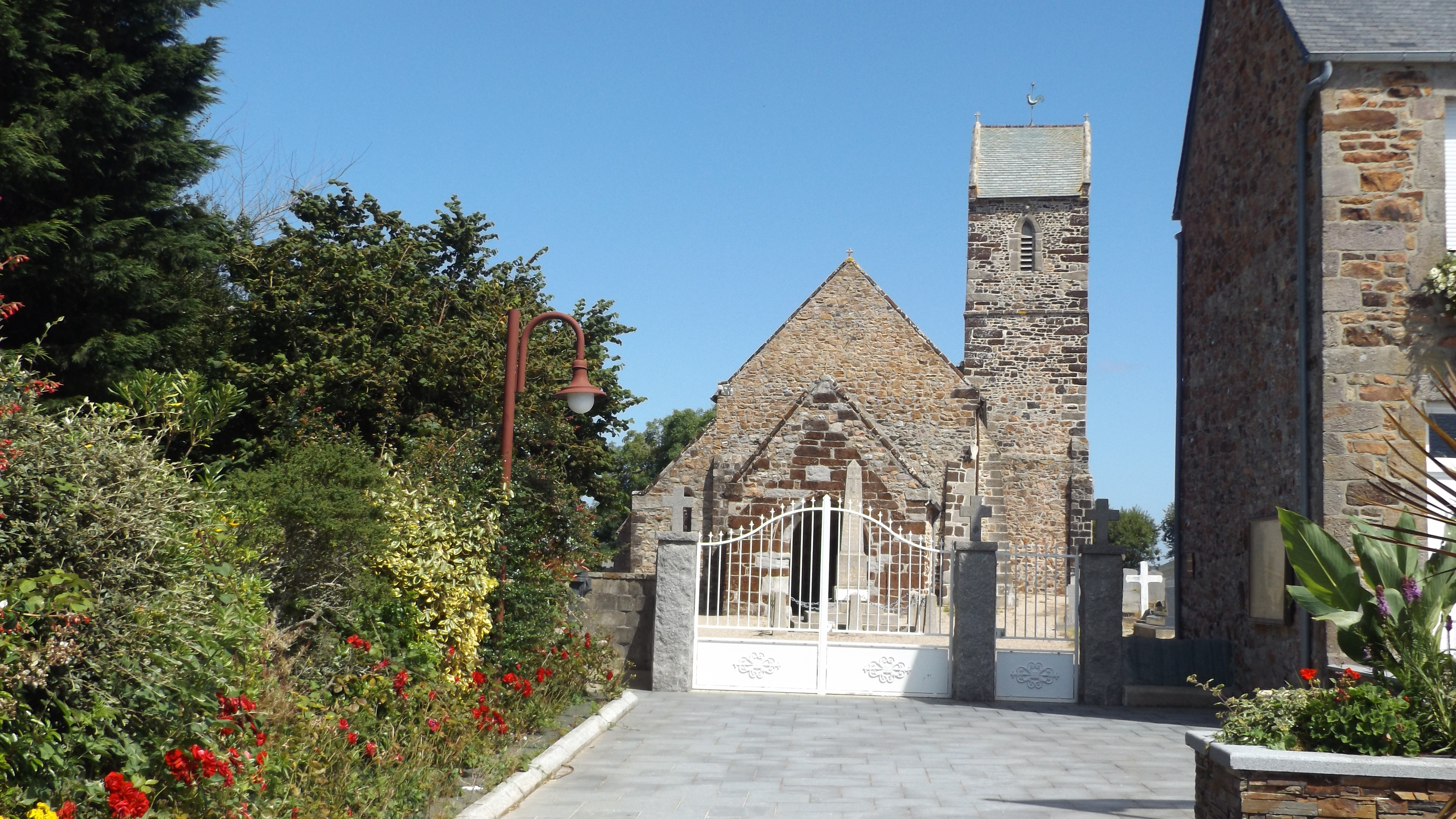 A gauche une fleuri, sur la droite, le bout du muret séparant le parking du parvis de la mairie, au centre, l'allée menant au portail blanc de la mairie. En fond, le pignon de l'église avec le clocher sur la droite